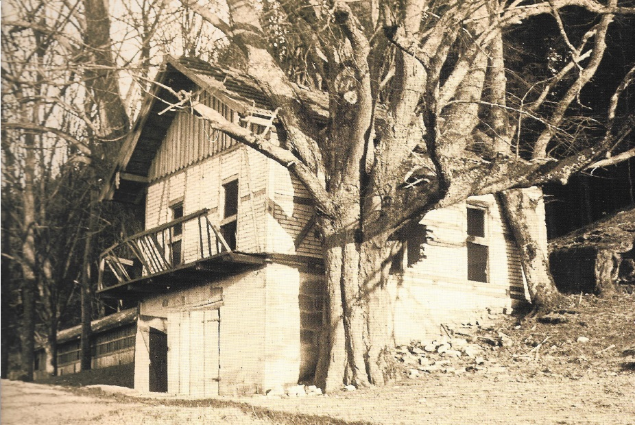 Ehemaliger Sommerkeller von Walting